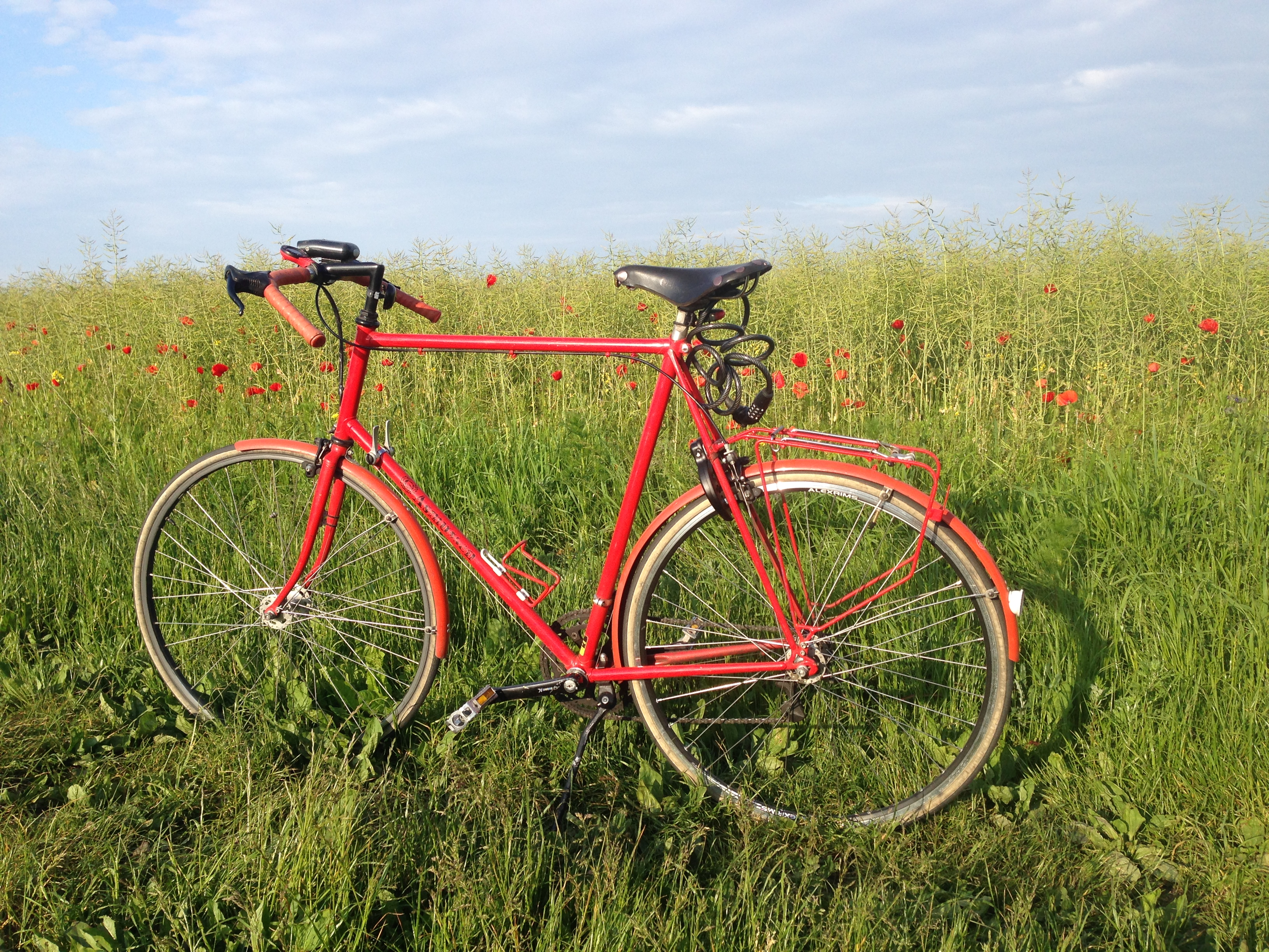 Specialbygget Asmussen Cykel 1987